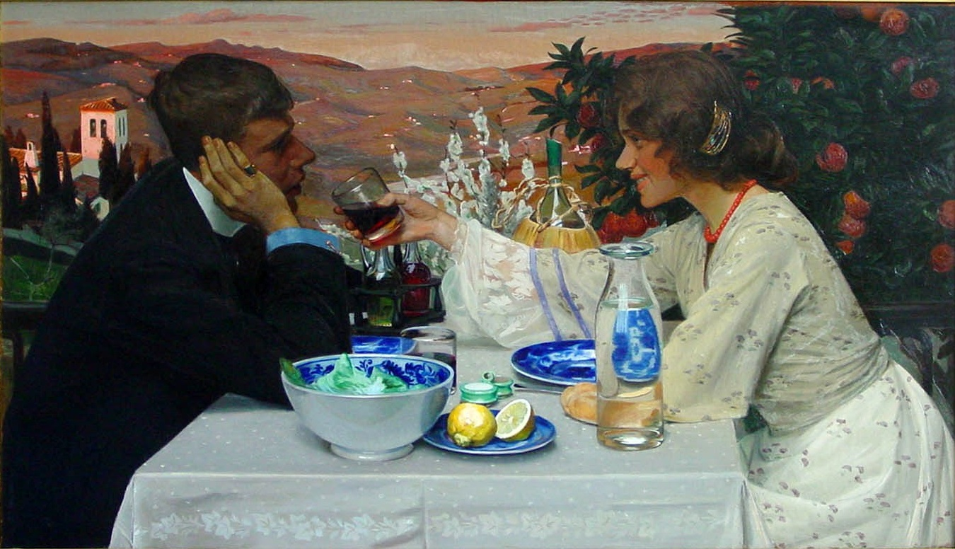 Primavera by Danish painter Harald Slott-Møller (17. august 1864 i København – 20. oktober 1937)